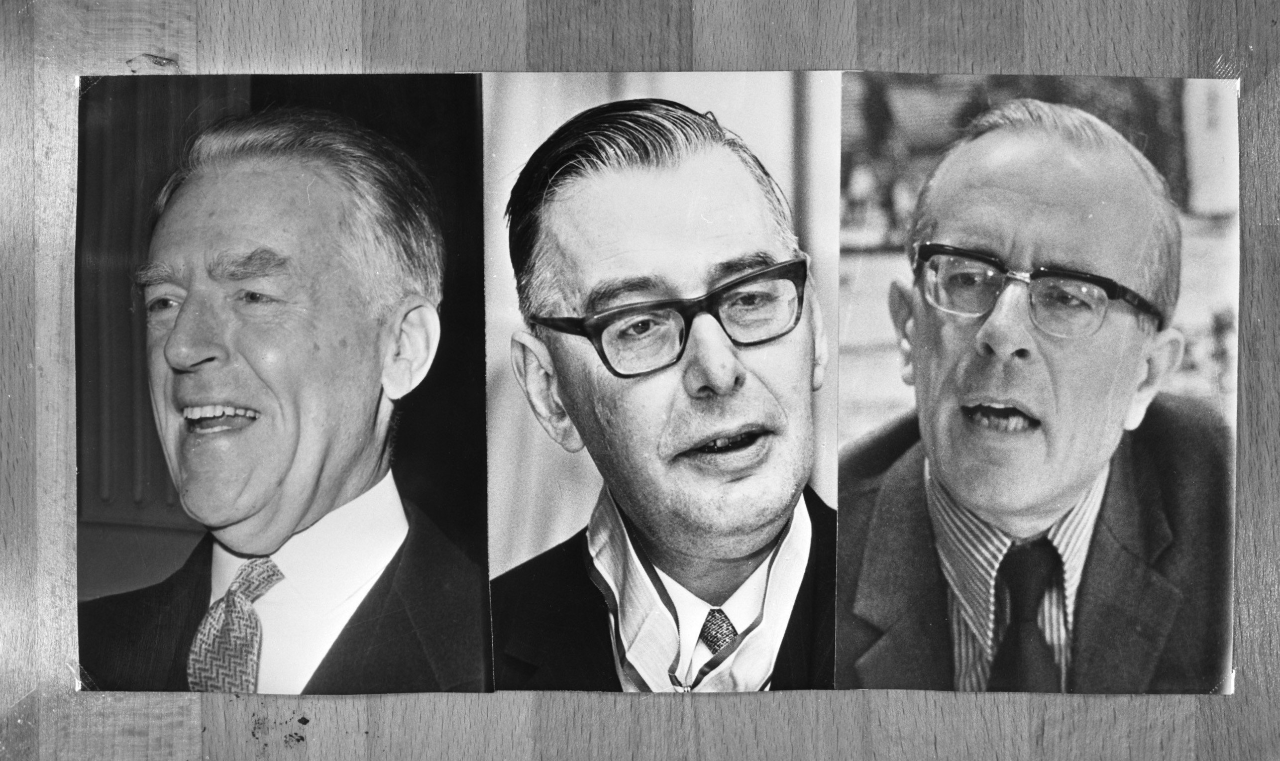 Collectie / Archief : Fotocollectie Anefo Reportage / Serie : [ onbekend ] Beschrijving : Commissie van Onderzoek inzake Lockheedaffaire; v.l.n.r. dr. H. W. Holtrop , mr. dr. A. M. Donner en drs. H. Peschar Datum : 11 februari 1976 Persoonsnaam : drs. H. Peschar Fotograaf : Fotograaf Onbekend / Anefo Auteursrechthebbende : Nationaal Archief Materiaalsoort : Negatief (zwart/wit) Nummer archiefinventaris : bekijk toegang 2.24.01.04 Bestanddeelnummer : 928-4102